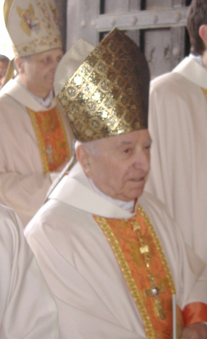 Cardinal Luigi Poggi